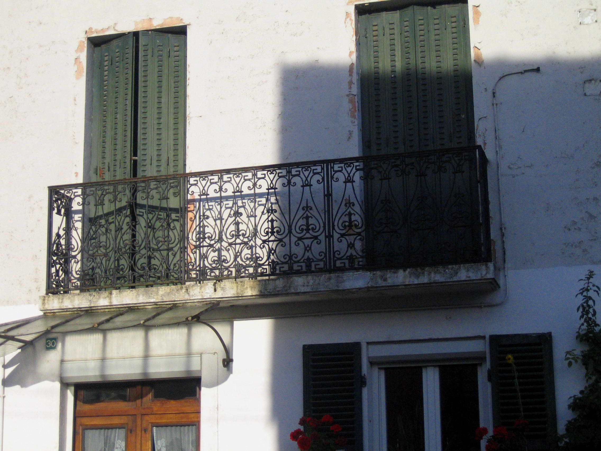 Fleurey-sur-Ouche (Côte-d'Or, France) - Balcon dans la rue principale du village, au numéro 30 de la «Grande rue du Bas».